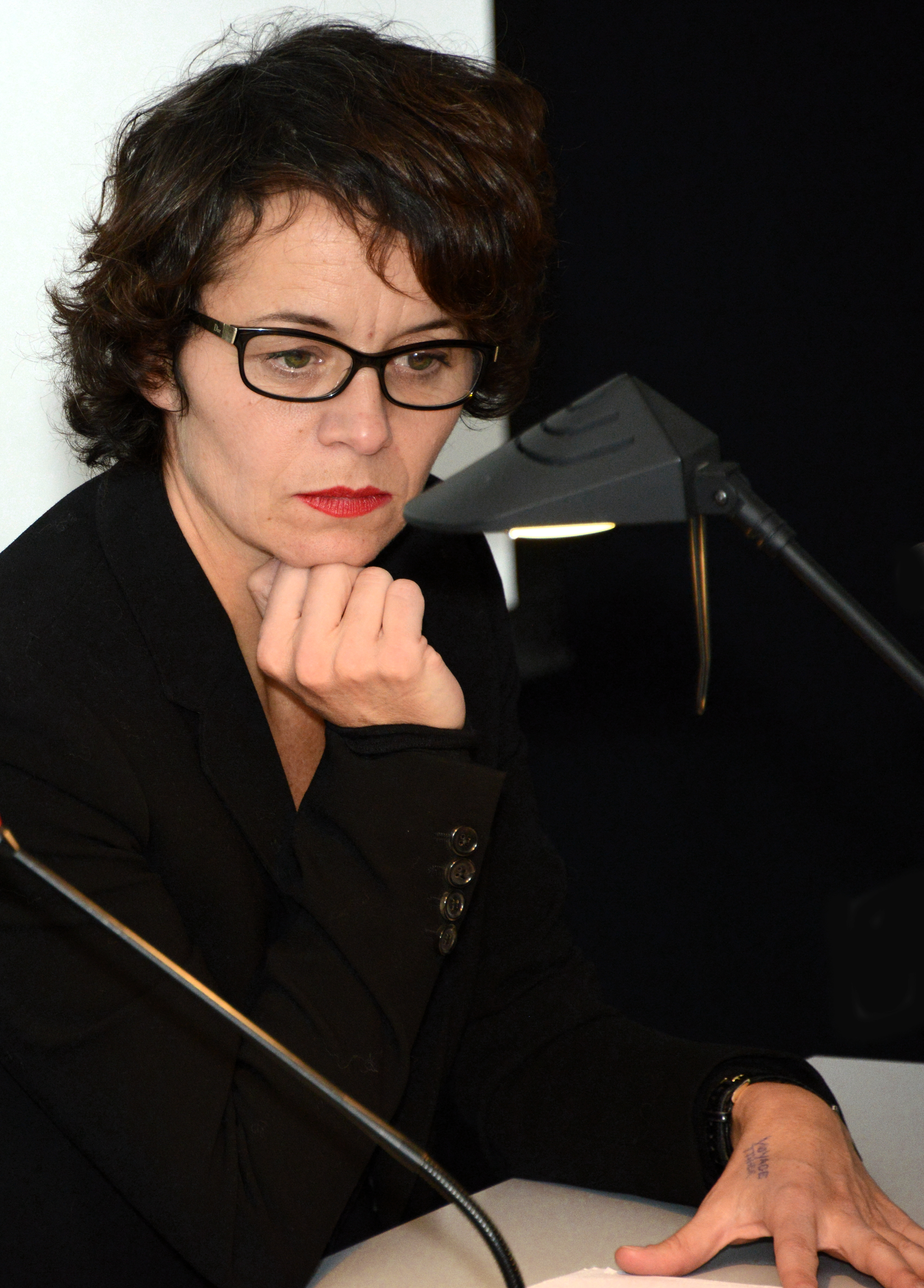 Am Kader vun der Commemoratioun vu 70 Joer Liberatioun vum KZ Auschwitz duerch d'Rout Arméi, huet de Steven Weinberg de 27. Januar 2015 am Auditorium Henri Beck aus sengem Buch «Deux voyageurs pour Breslau» virgelies. D'Schauspillerin Sophie Langevin dréit ofwiesselnd mam Auteur aus dem Wierk vir.